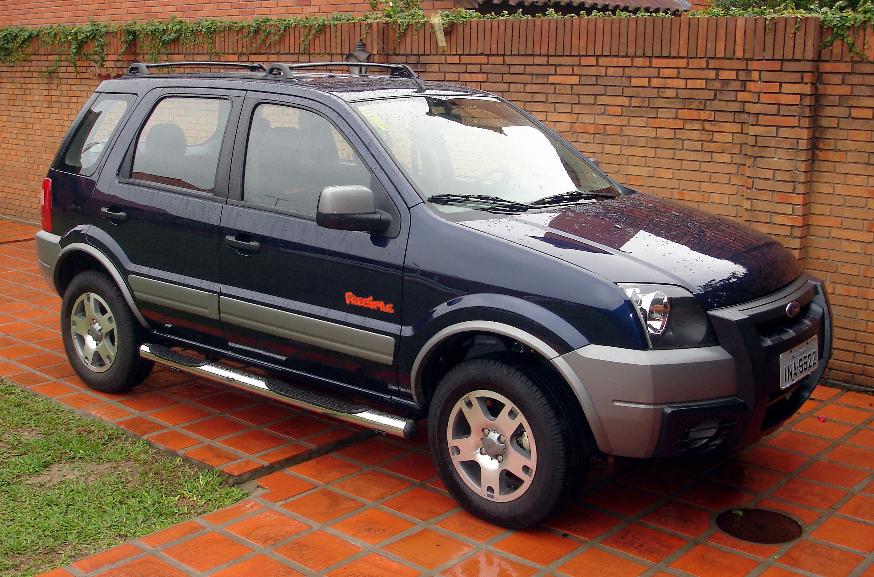 A EcoSport.